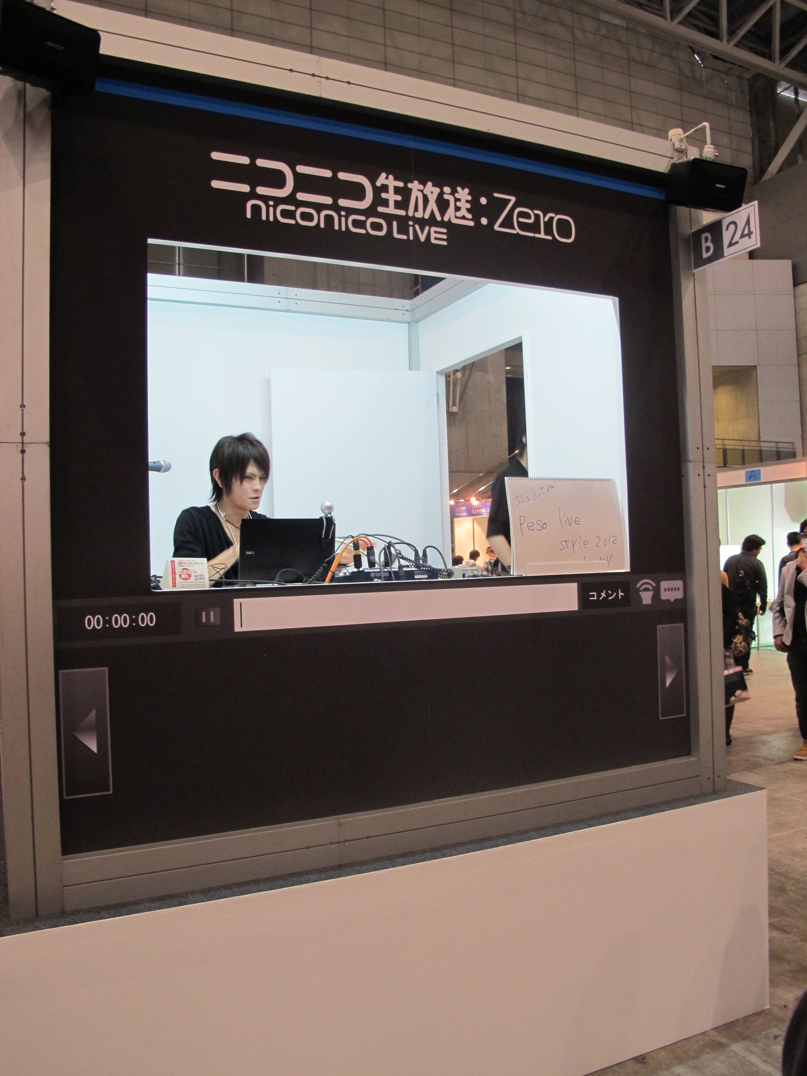 中文（台灣）: Niconico超會議，Niconico直播室。